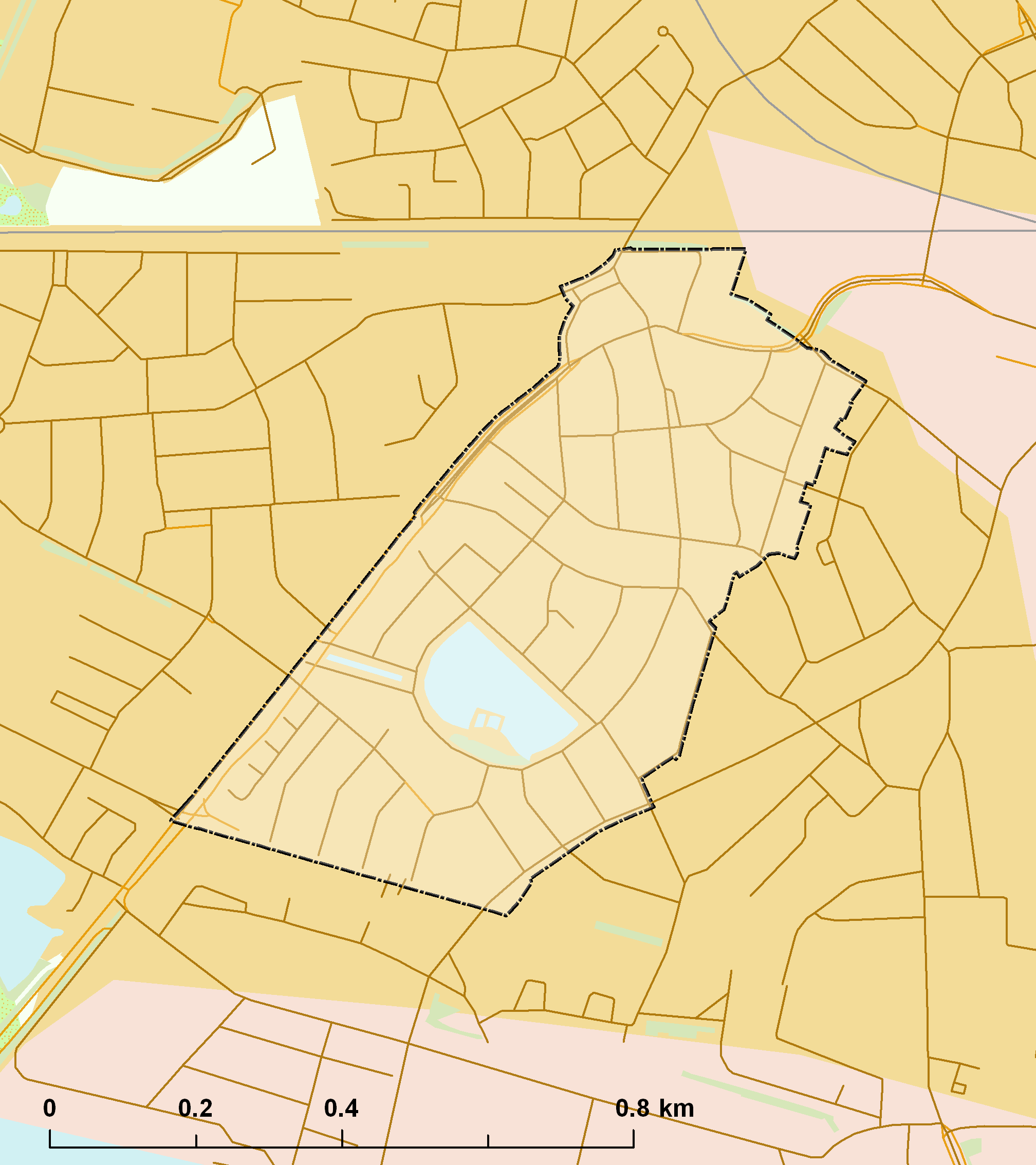 Rijksbeschermd stads- of dorpsgezicht - Hengelo - Tuindorp 't Lansink.png